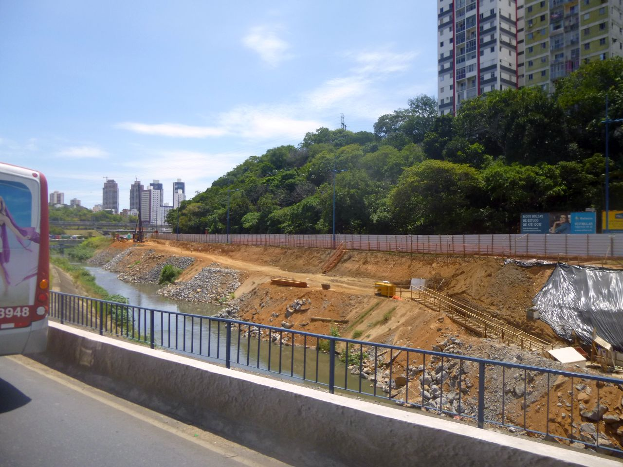 Salvador Metro Neubau Linie 2